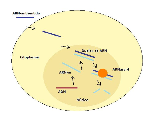 Esquema con el proceso de degradación de duplex de ARN por la ARNasa H